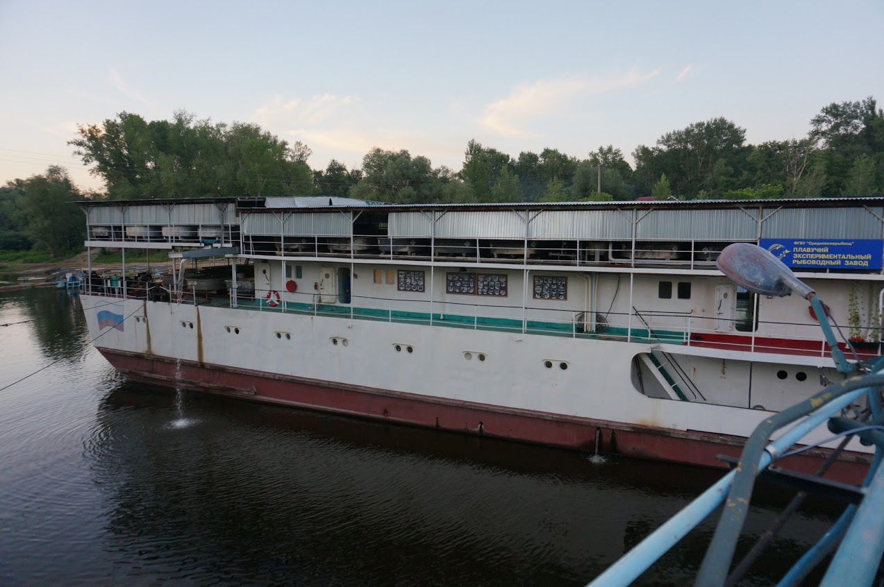 Рыбоводный завод на полуострове Коплово. Тольятти